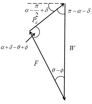 主働土圧時の連力図